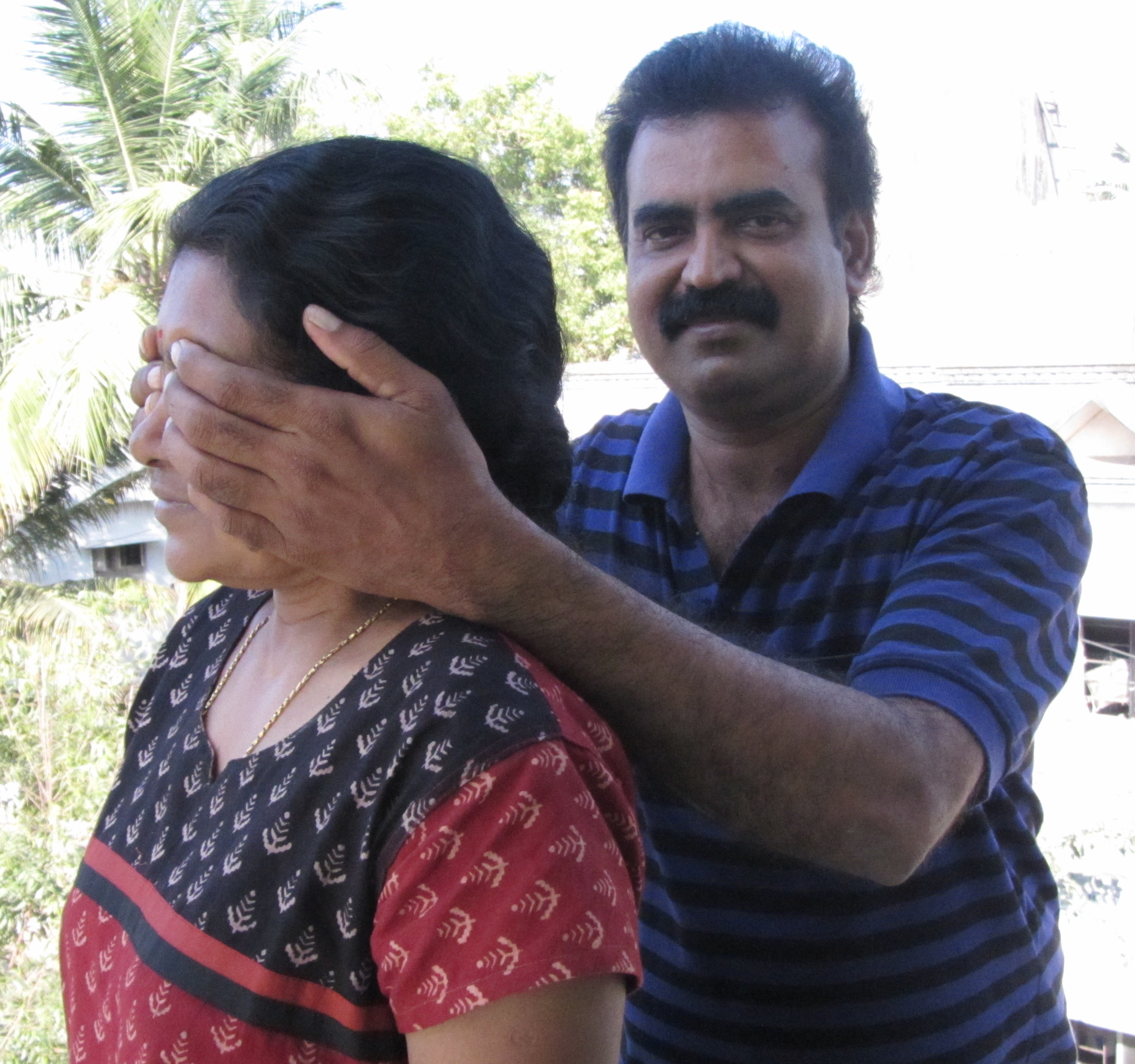 கண்புதை - காதலர் விளையாட்டு - அகநானூறு 9 அடி 20 - எனது படம்